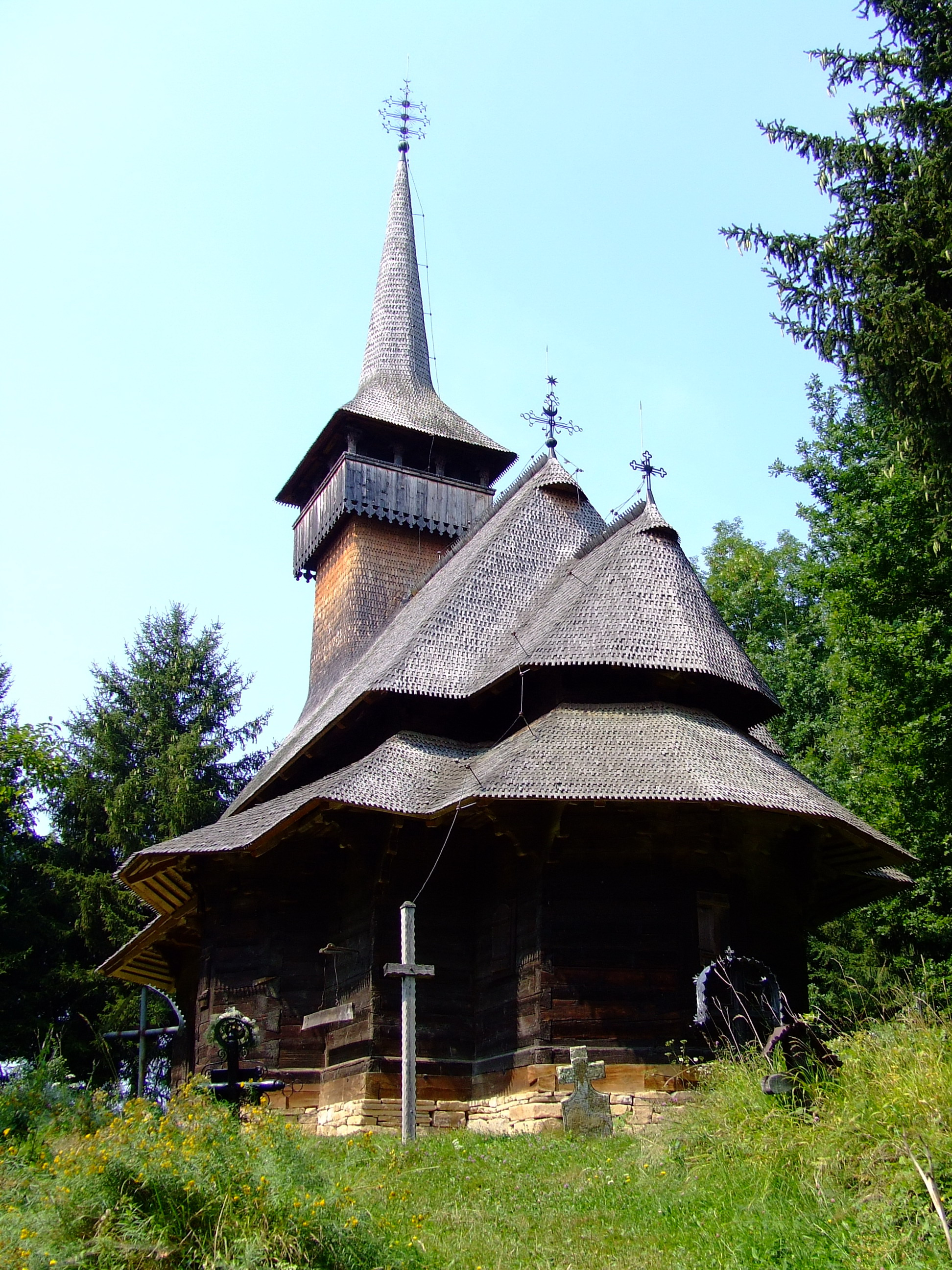 Biserica de lemn din Călinești Susani, județul Maramureș.